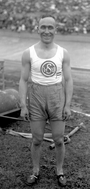 Das große nationale Jubiläums-Sportfest im deutschen Stadion. Das Pushballspiel, welches erstmalig in Deutschland gespielt wurde. Houben, der neue deutsche Weltrecordmann im 100 m Laufen.